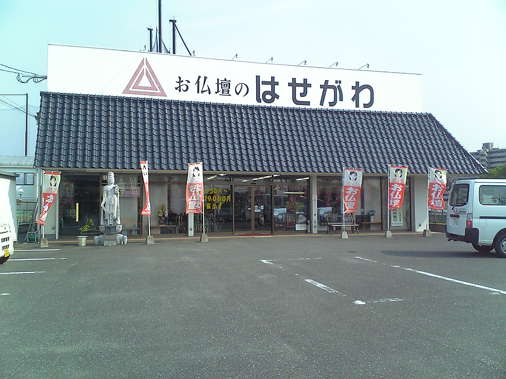 はせがわ前原店（福岡県前原市）